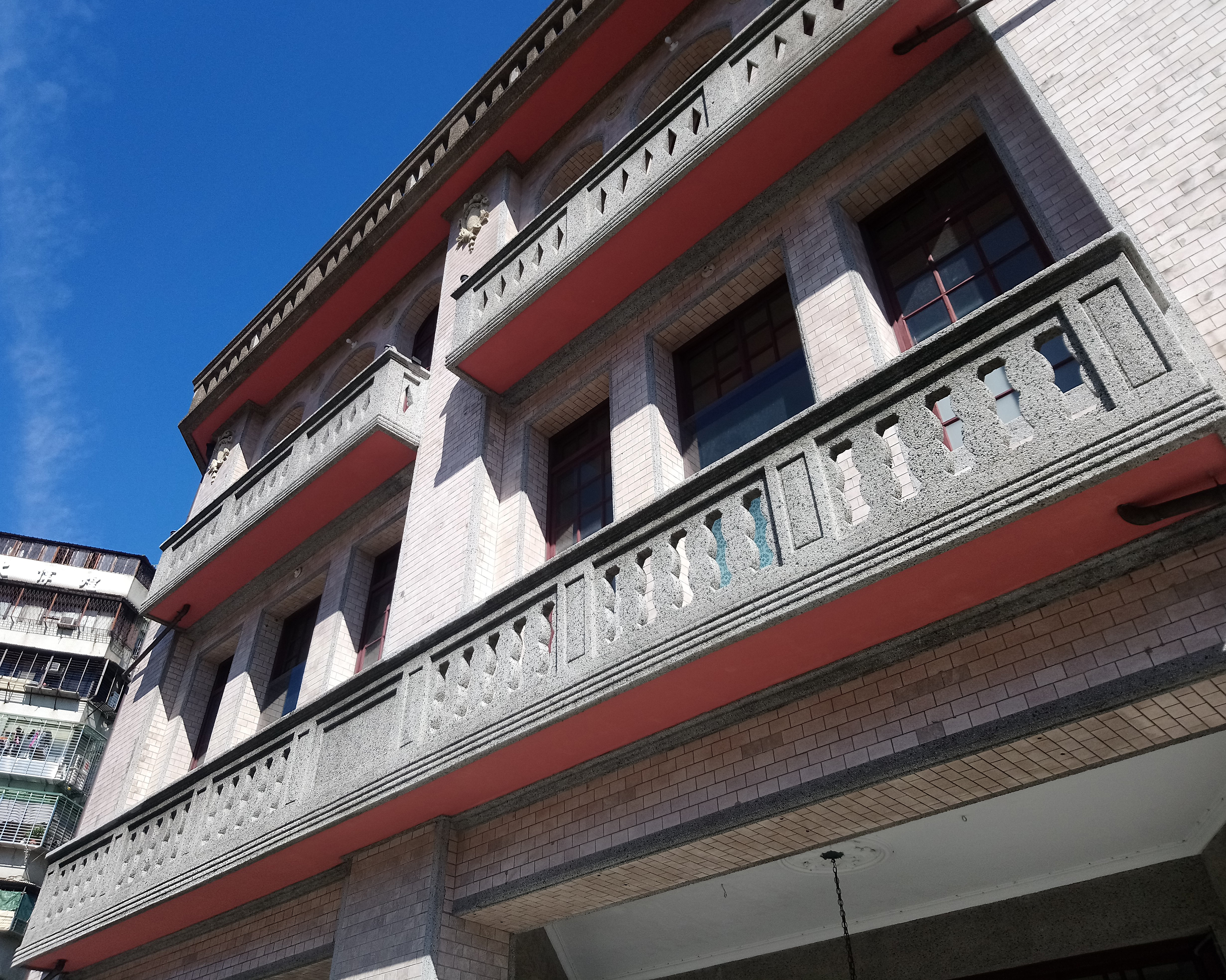 萬華林宅陽臺,臺北市萬華區龍山次分區富福里